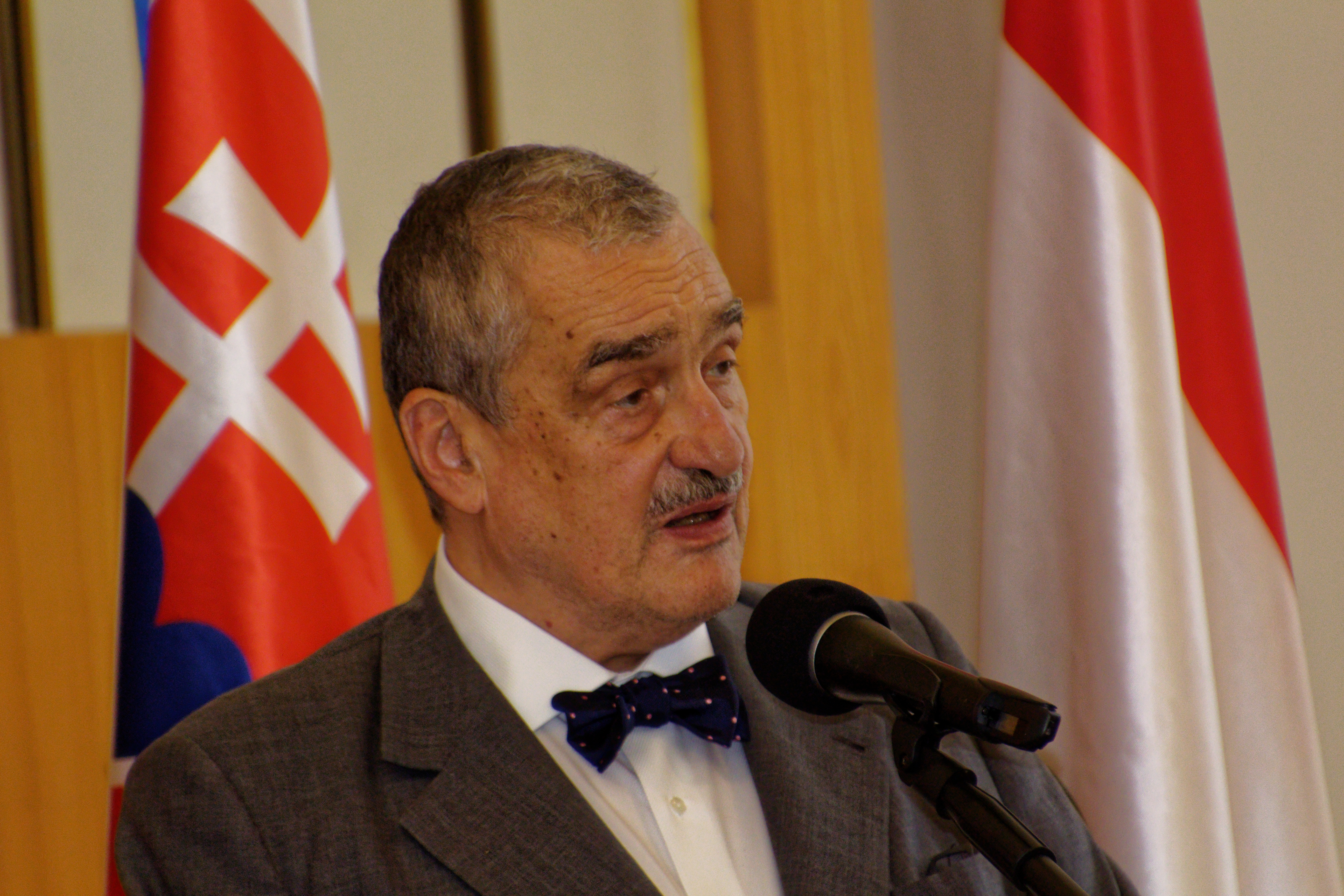 Karel Fürst Schwarzenberg; Adalbert-Preis Verleihung 2015 in Bratislava